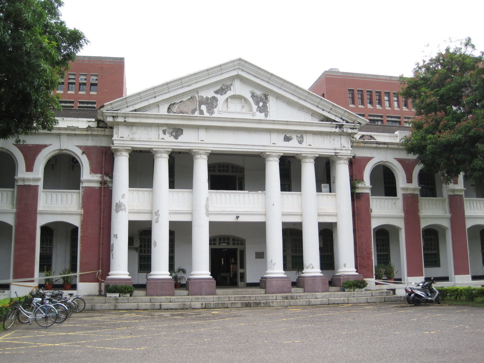 中文（台灣）: 成功大學歷史系館，為日治時期的日軍步兵第二聯隊營舍。